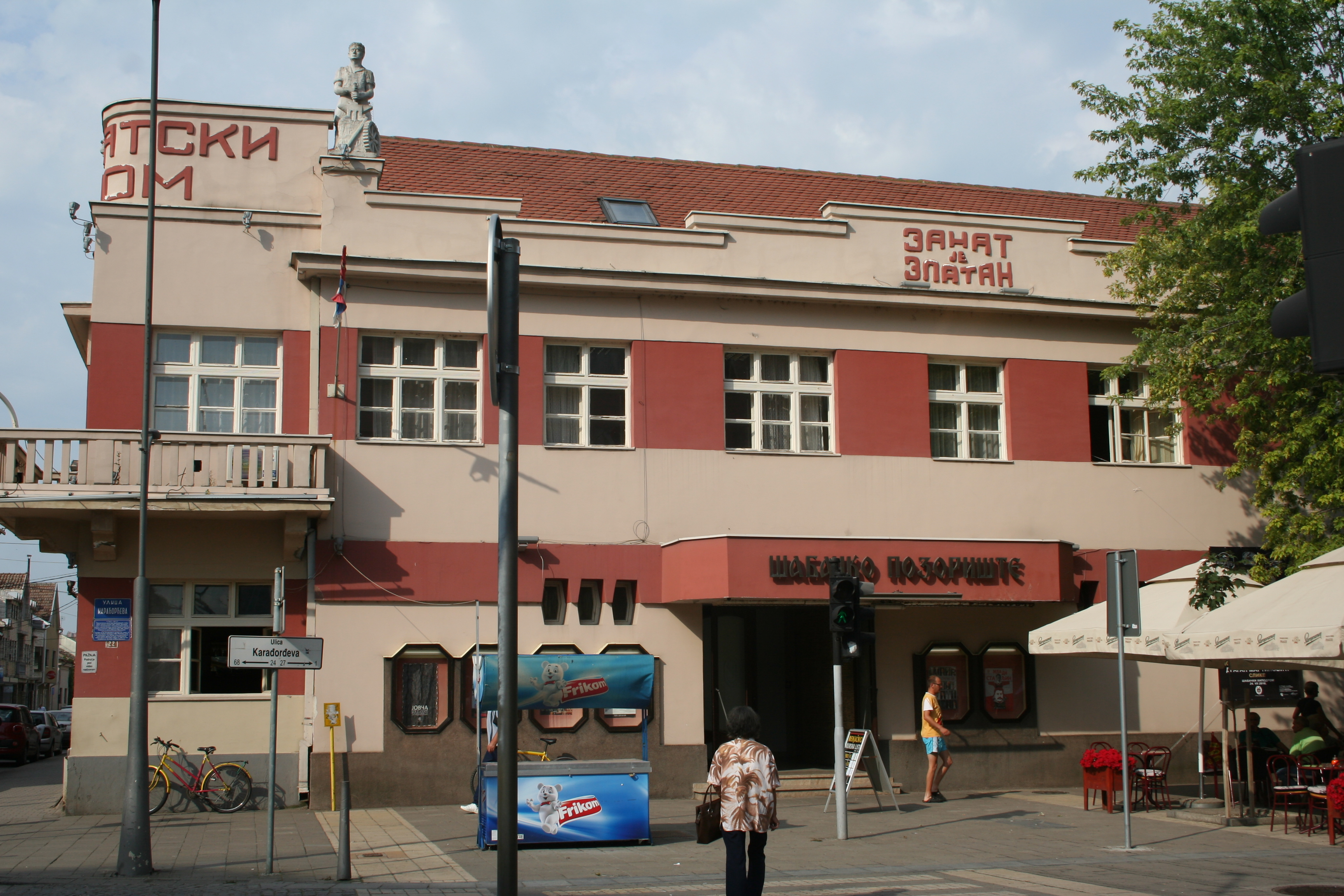 Zgrada pozorišta Šabac